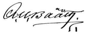 Albert Ulrik Baaths signatur